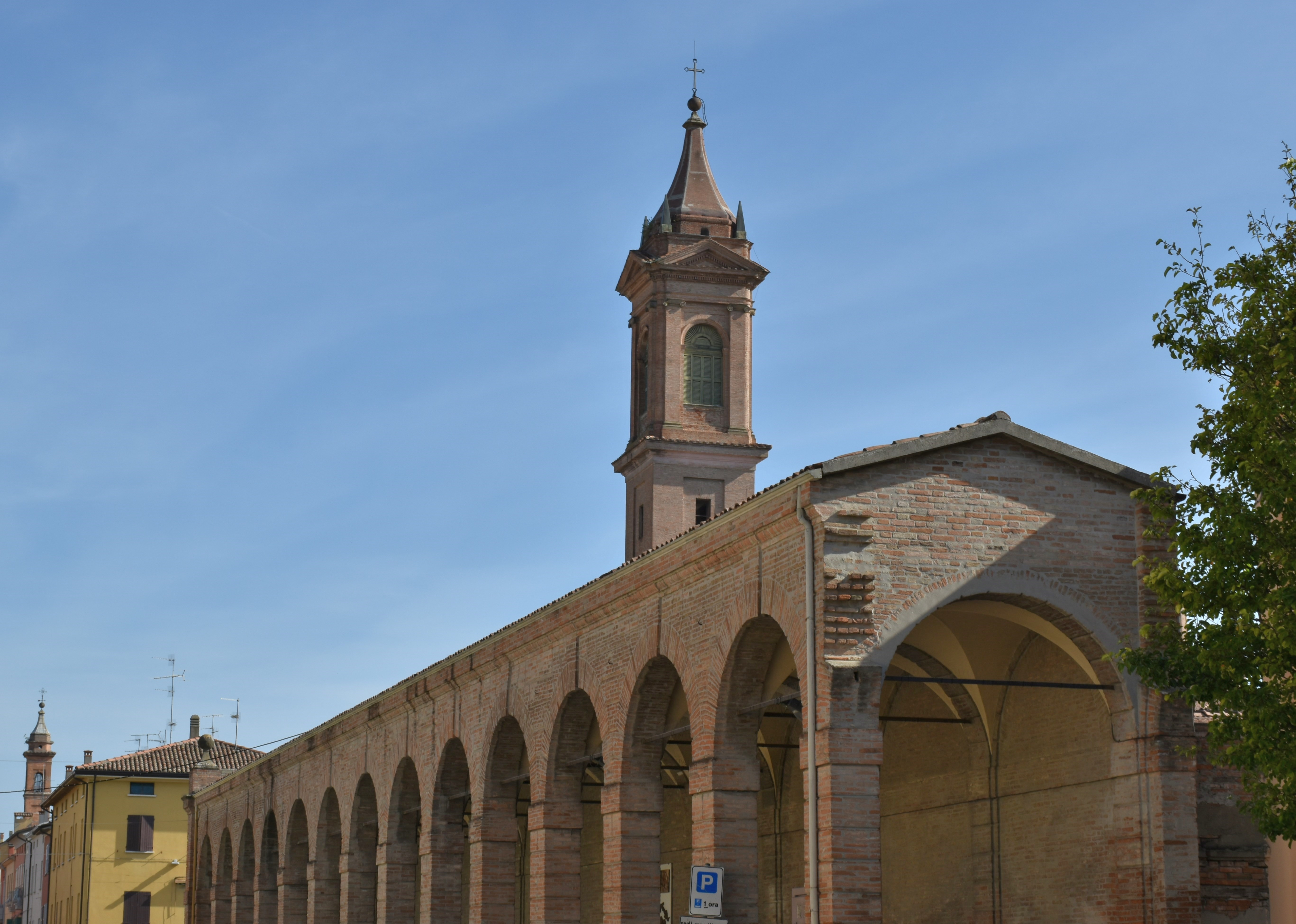 Portico Venturoli This is a photo of a monument which is part of cultural heritage of Italy.